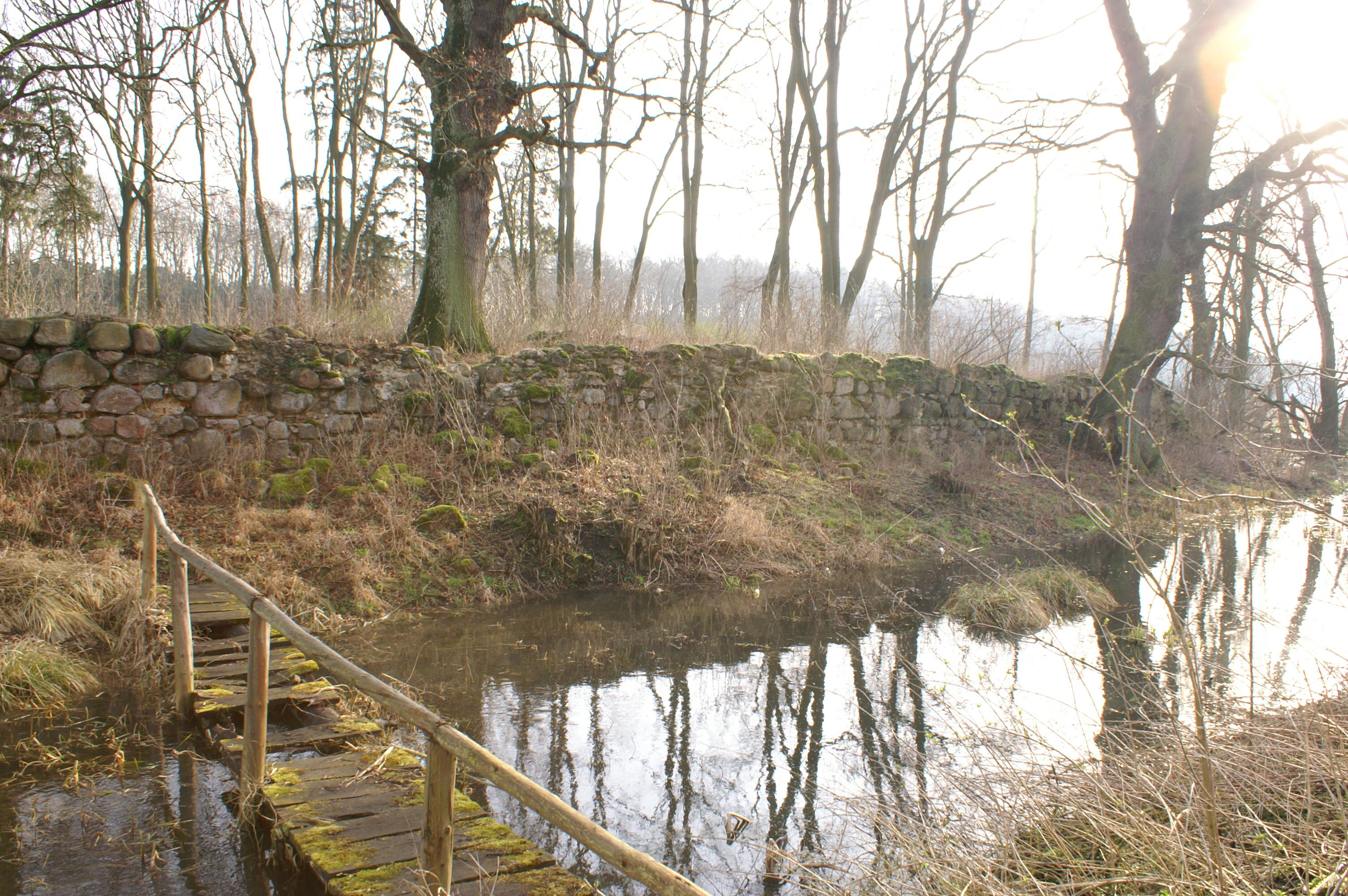 Ruine der Burg Osten - Nordteil